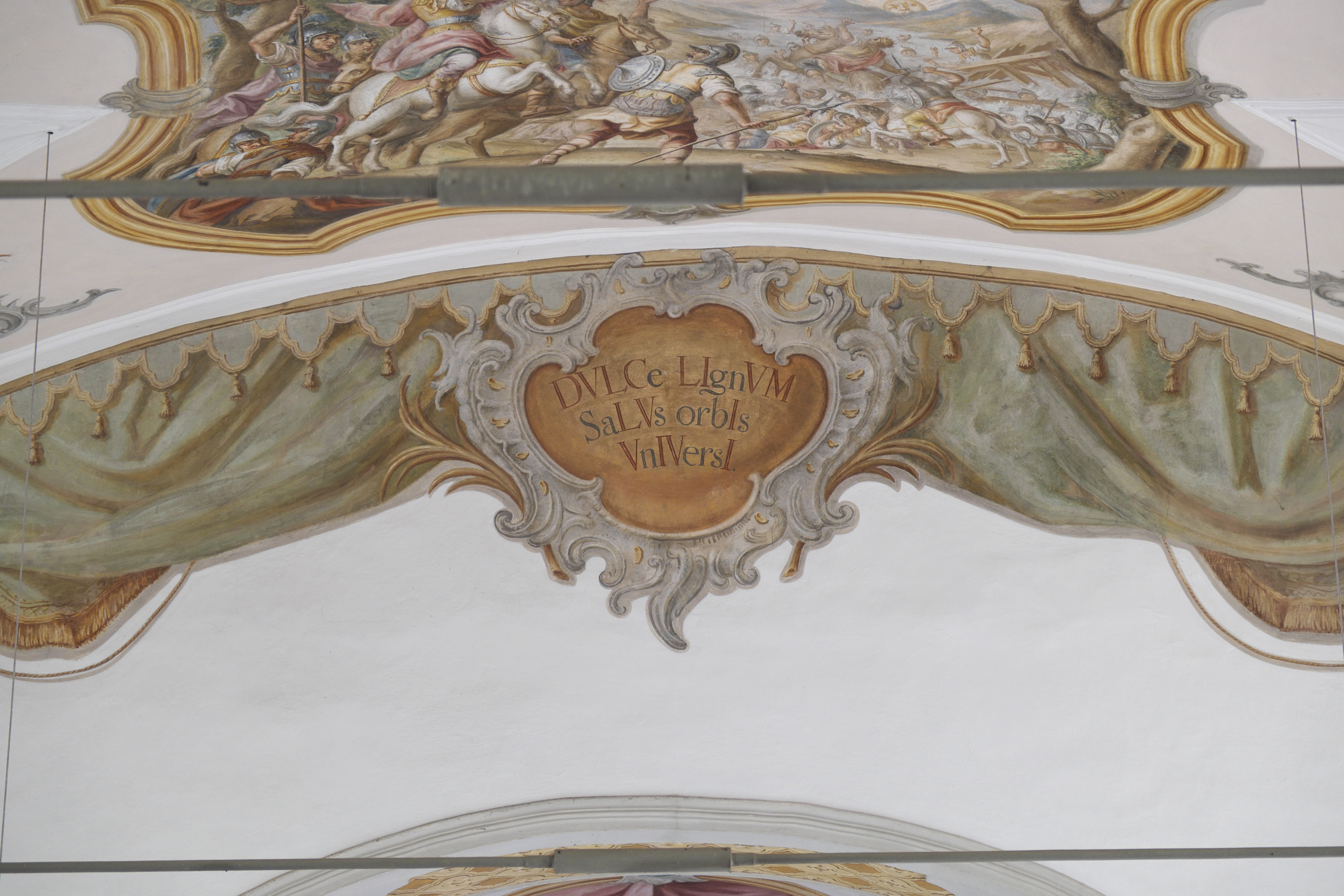 Katholische Pfarrkirche Heilig Kreuz in Schwabhausen bei Landsberg, einem Ortsteil von Weil (Oberbayern) im Landkreis Landsberg am Lech (Bayern/Deutschland), stuckimitierende Malerei von Vitus Felix Rigl, Chronogramm am Chorbogen